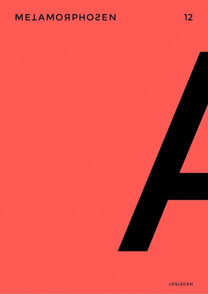 Titelseite